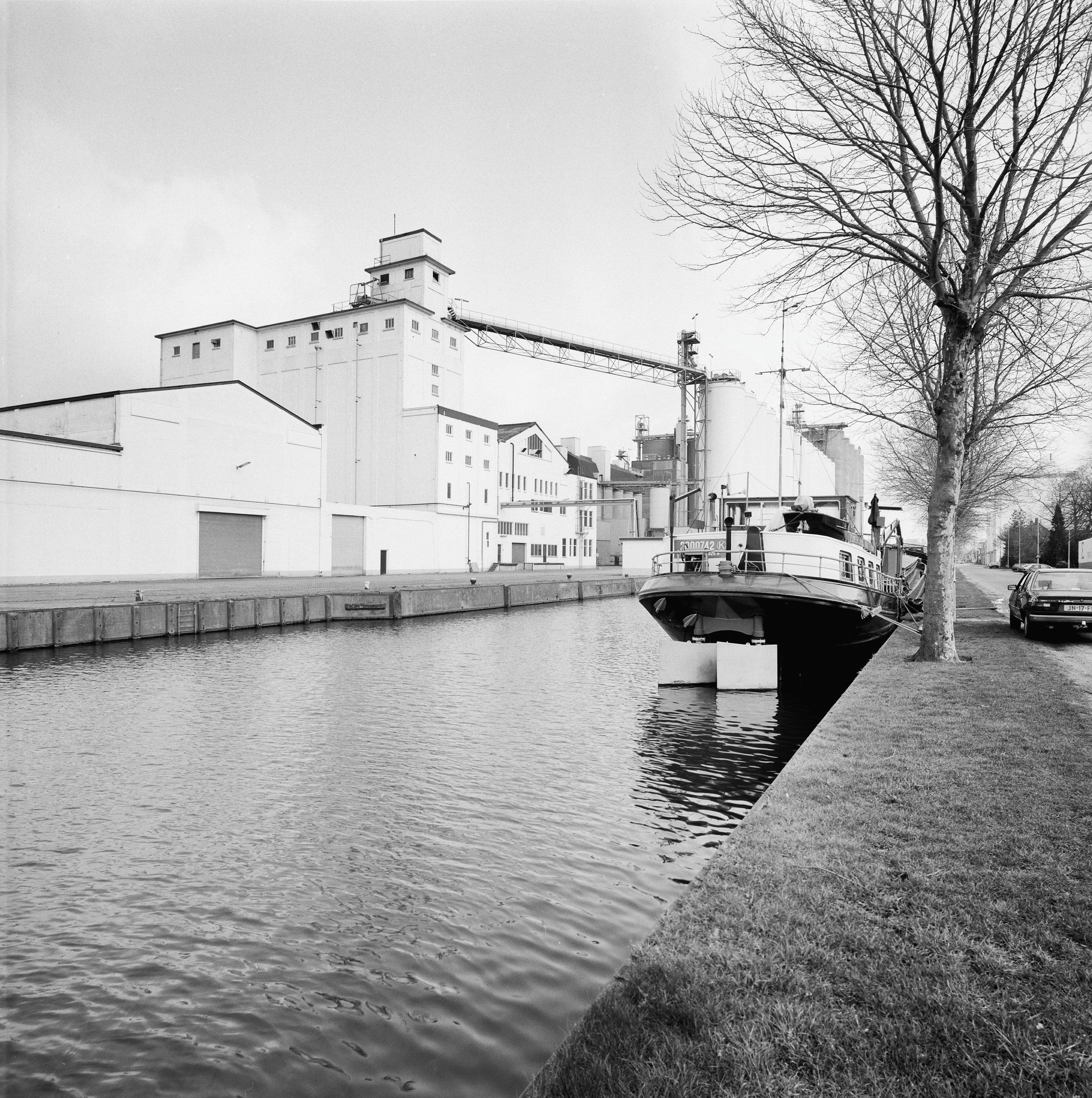 Silo: Exterieur OVERZICHT